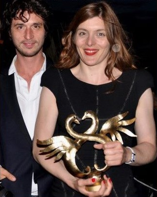 Jérémie Elkaïm et Valérie Donzelli lors de la présentation du film "La Guerre est déclarée" au festival de Cabourg